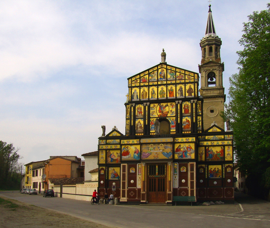 Chiesa di San Pietro a Pizzighettone (CR)